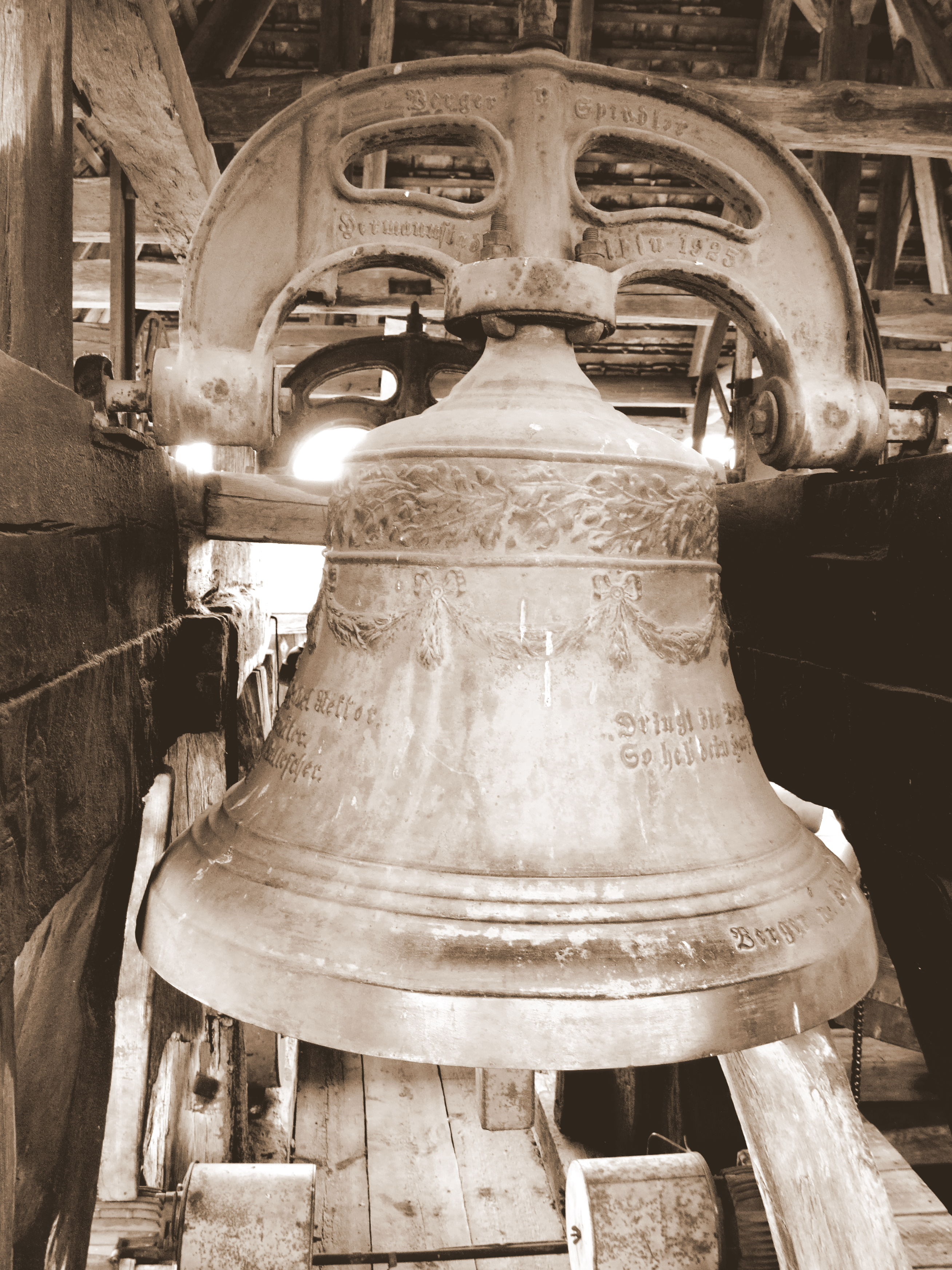 Câlnic AB-II-a-A-00196